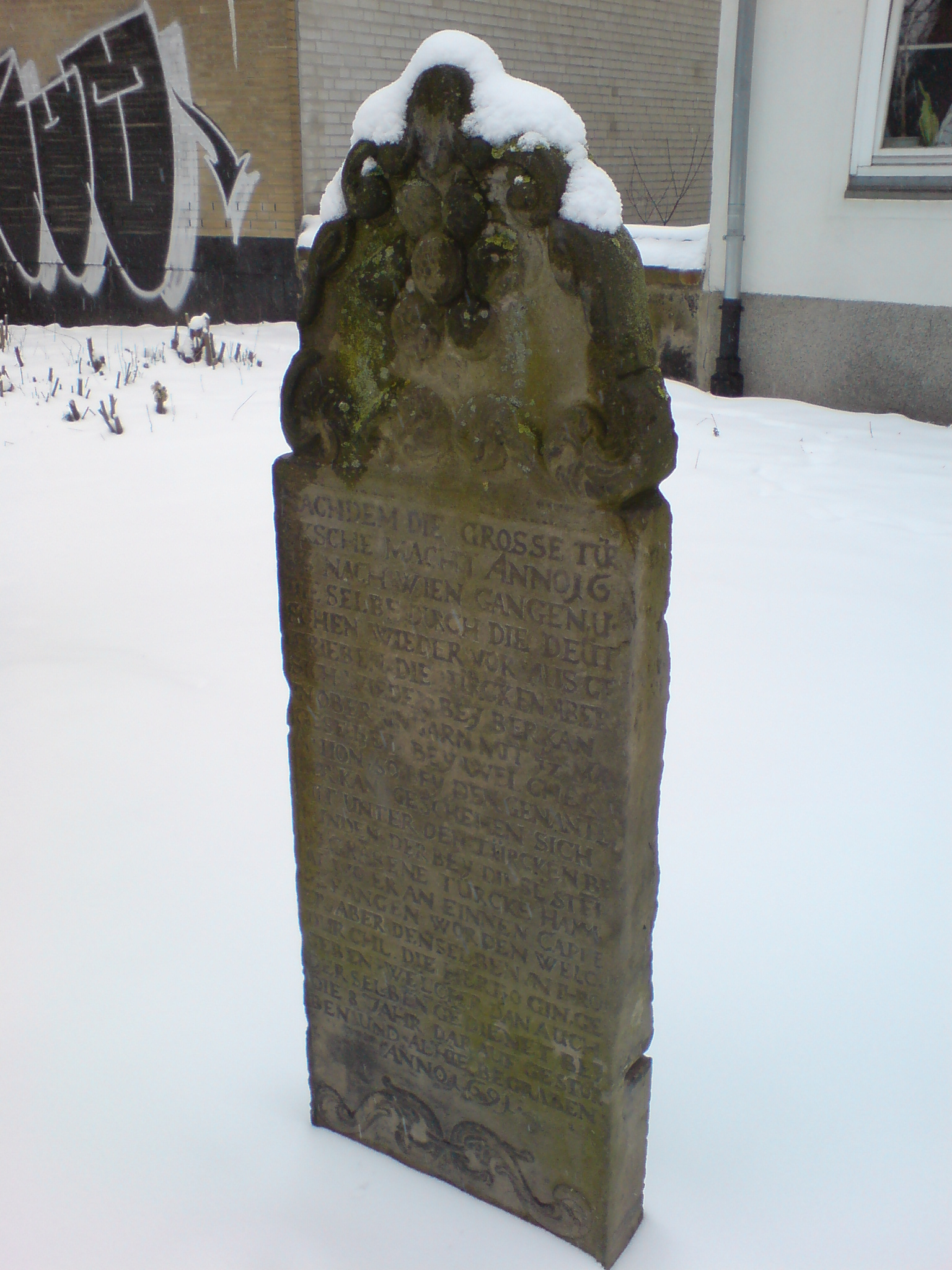 eins der beiden Grabmäler für Hammet (Mehmed) und Hassan, die 1683 durch hannoversche Truppen vor Wien gefangengenommen wurden und dann als Lakaien in den Diensten von Kurfürstin Sophie von der Pfalz standen